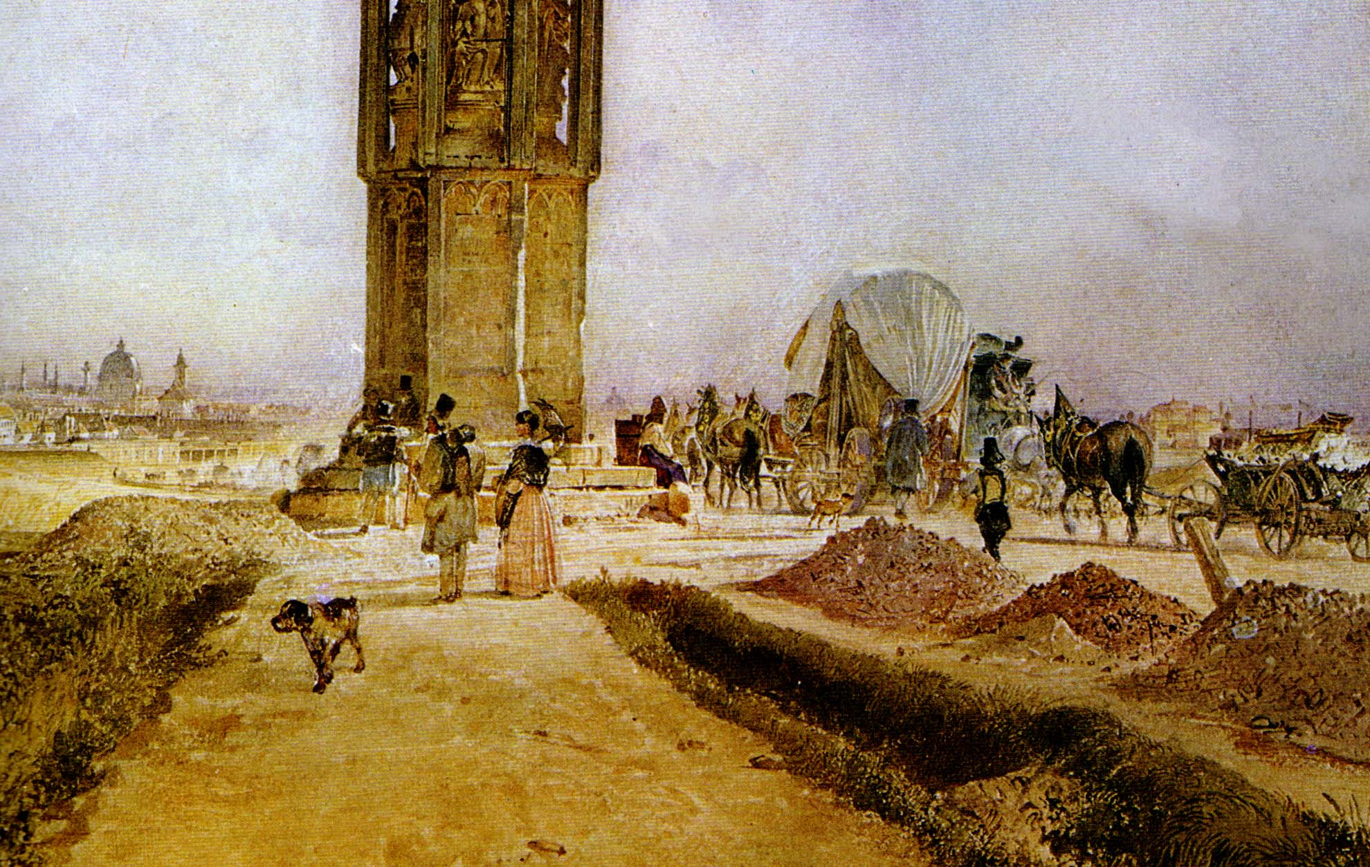 Stoßverkehr auf der Reichsstraße detail